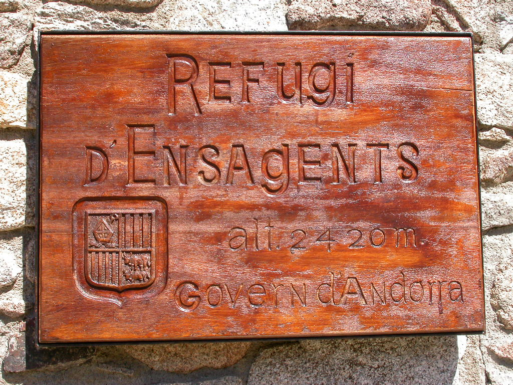 Refuges Andorre